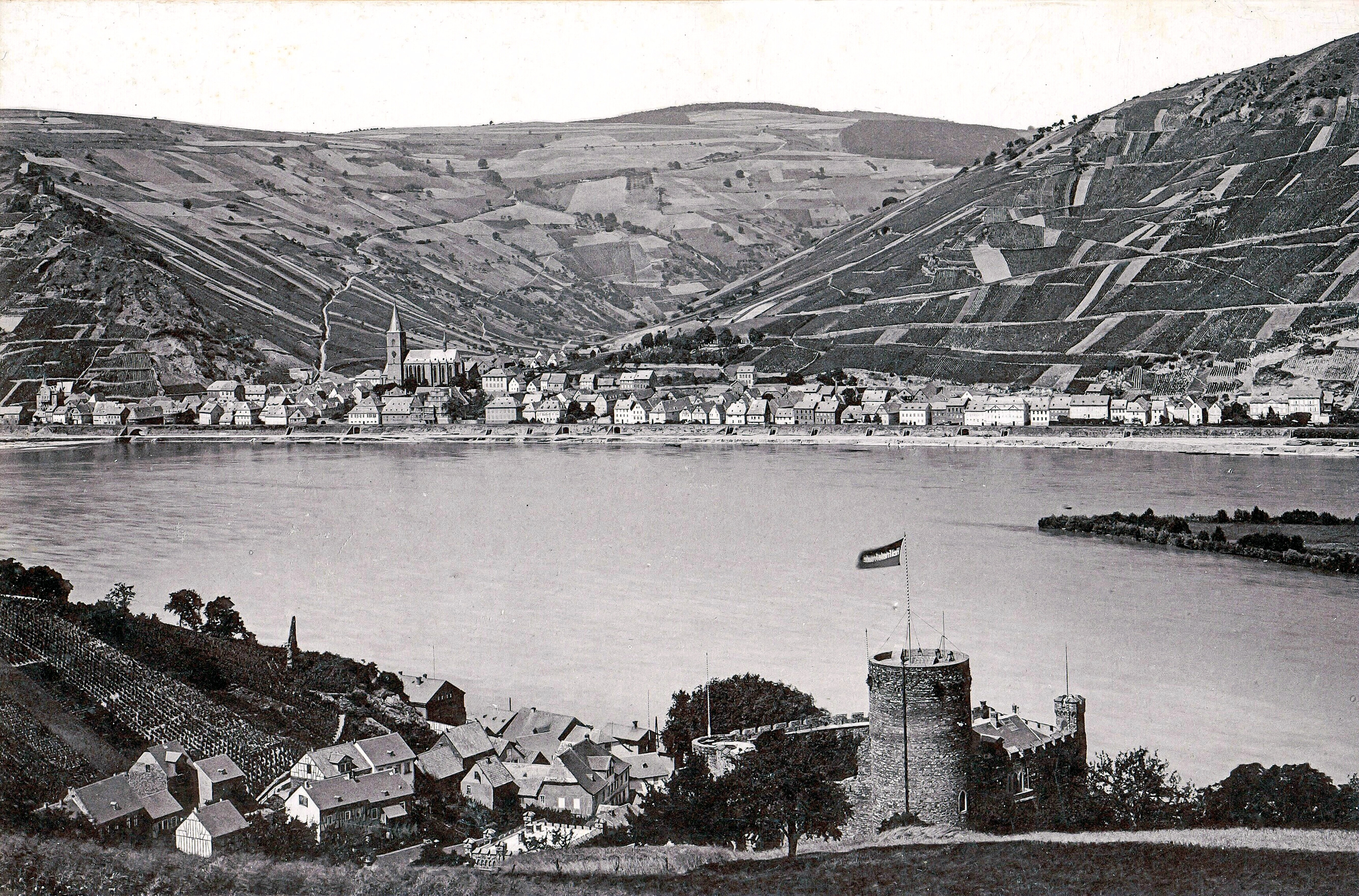 Lorch, Heimbach mit Heimburg, 1895